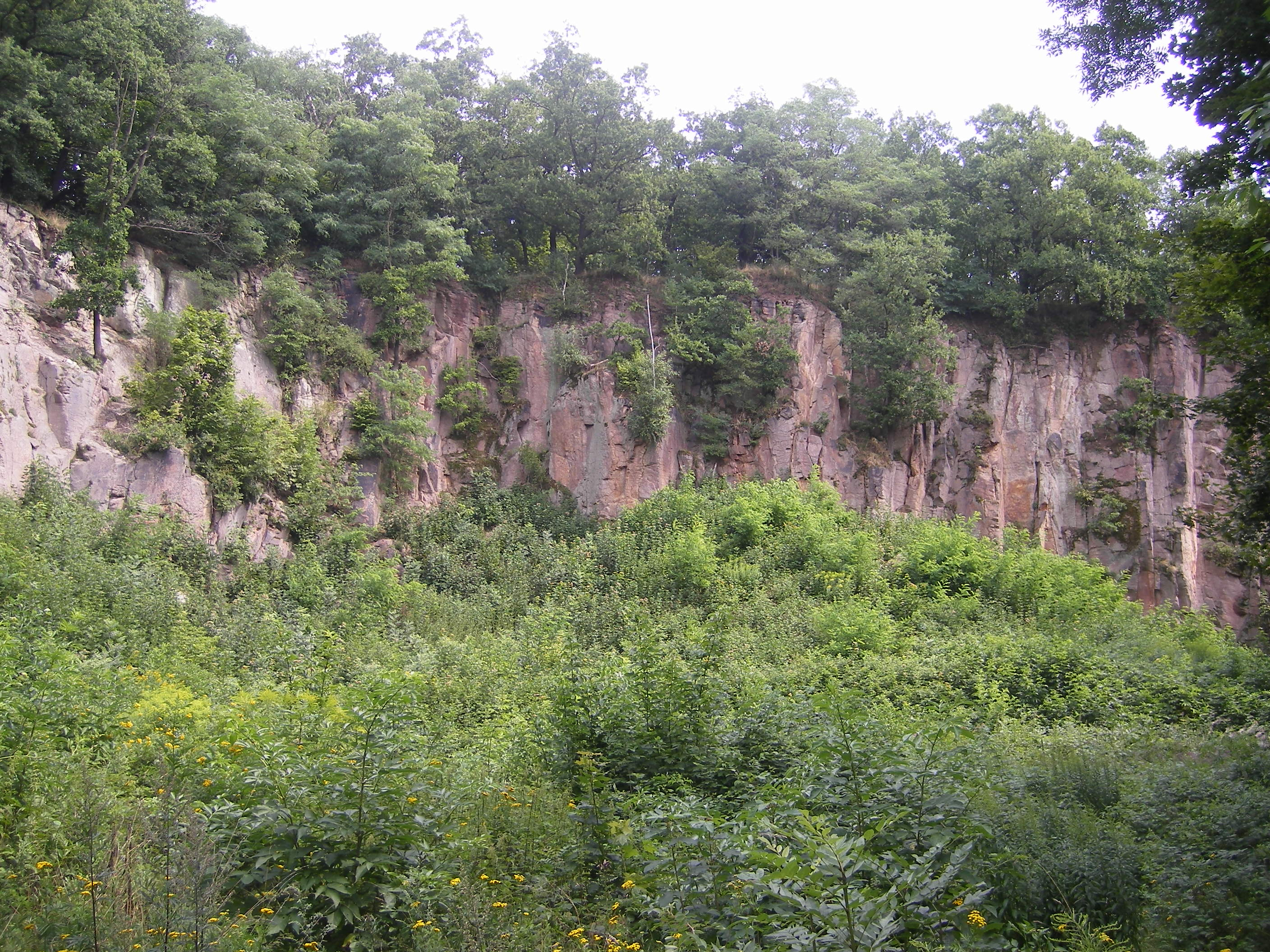 Das Flächennaturdenkmal Paditzer Schanzen in der Nähe von Altenburg in Ostthüringen.